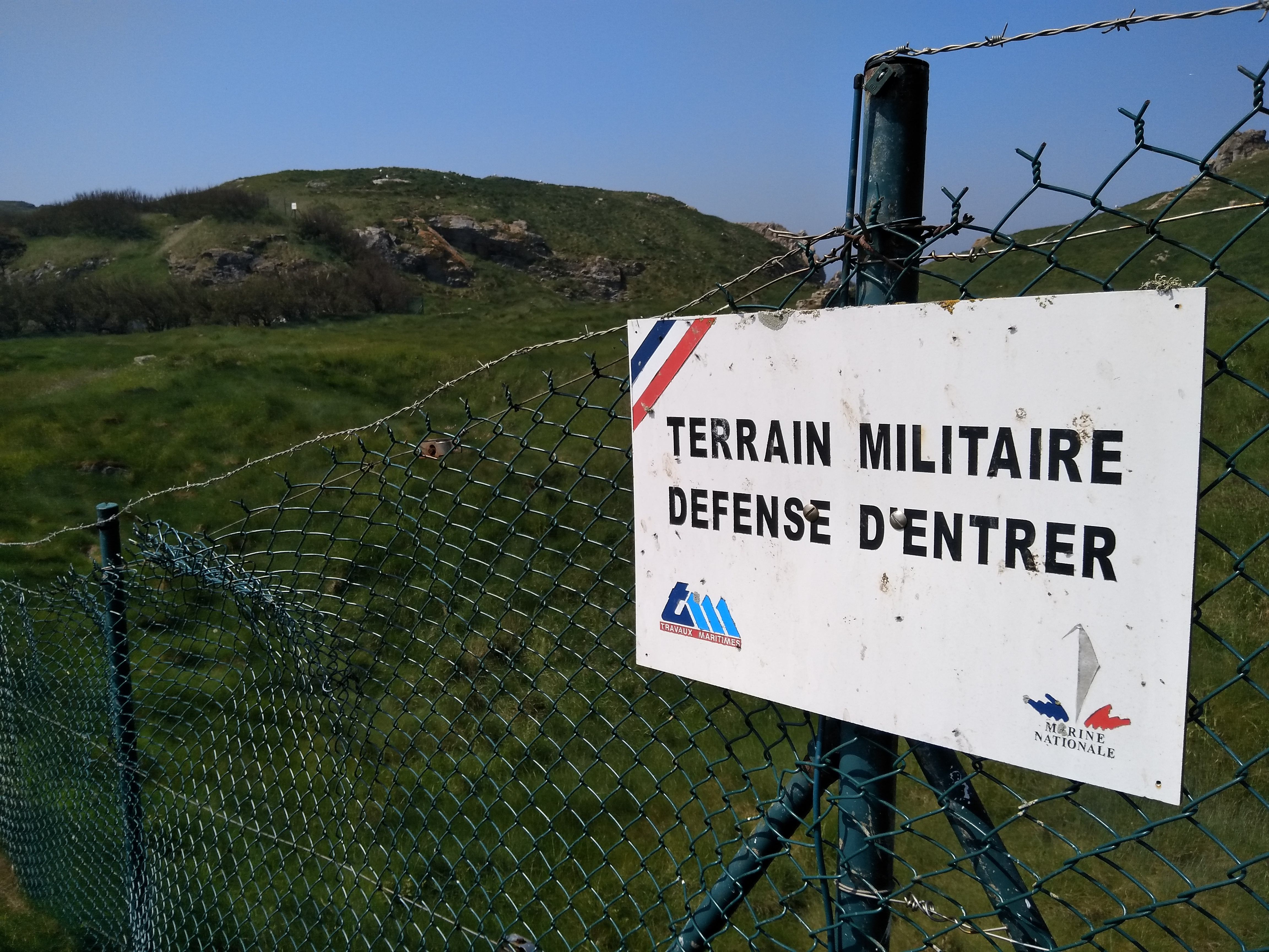 Clôture et panneau indiquant "terrain militaire, défense d'entrer" sur l'île de Cézembre (35, France)